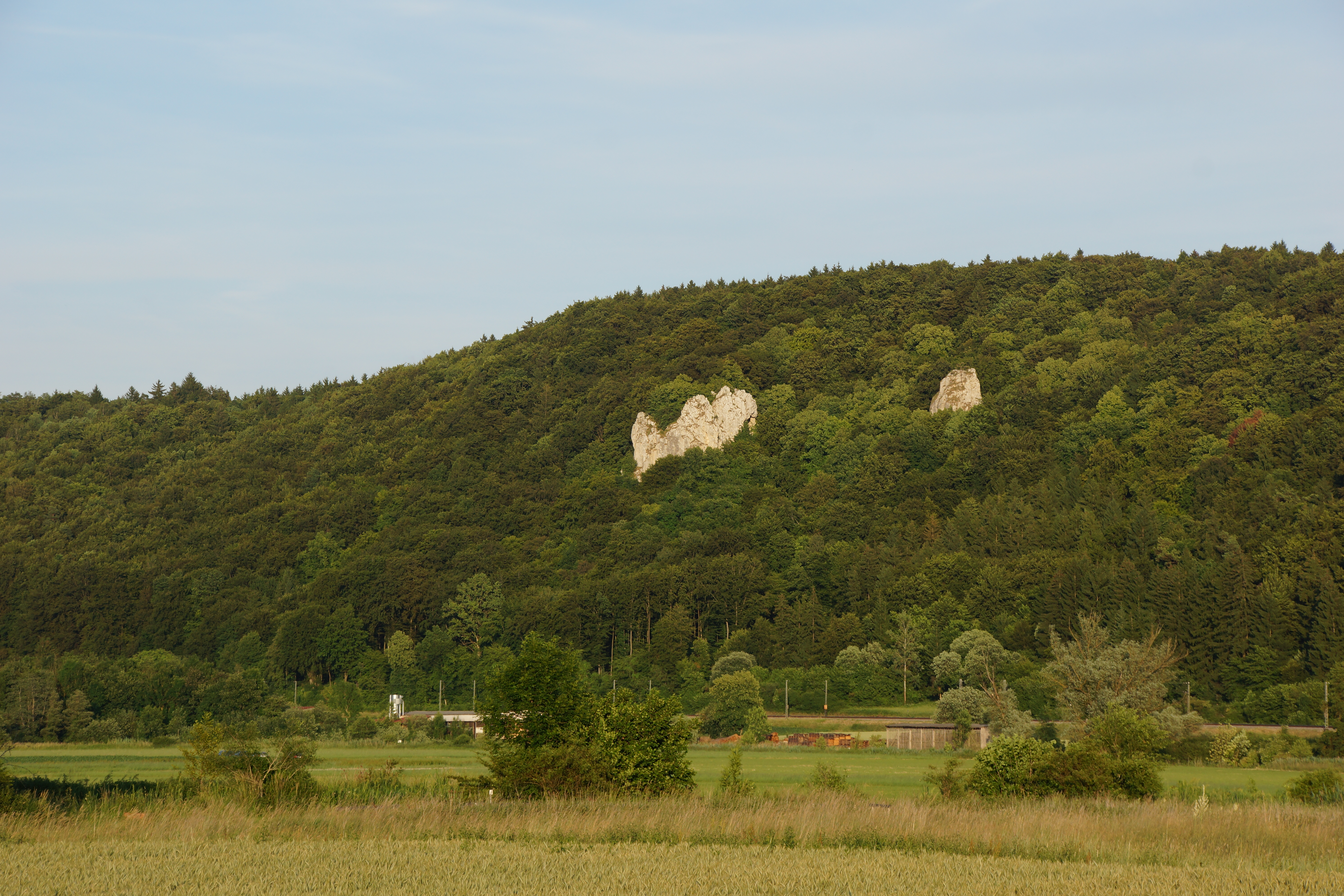 Das Altmühltal unterhalb von Dollnstein